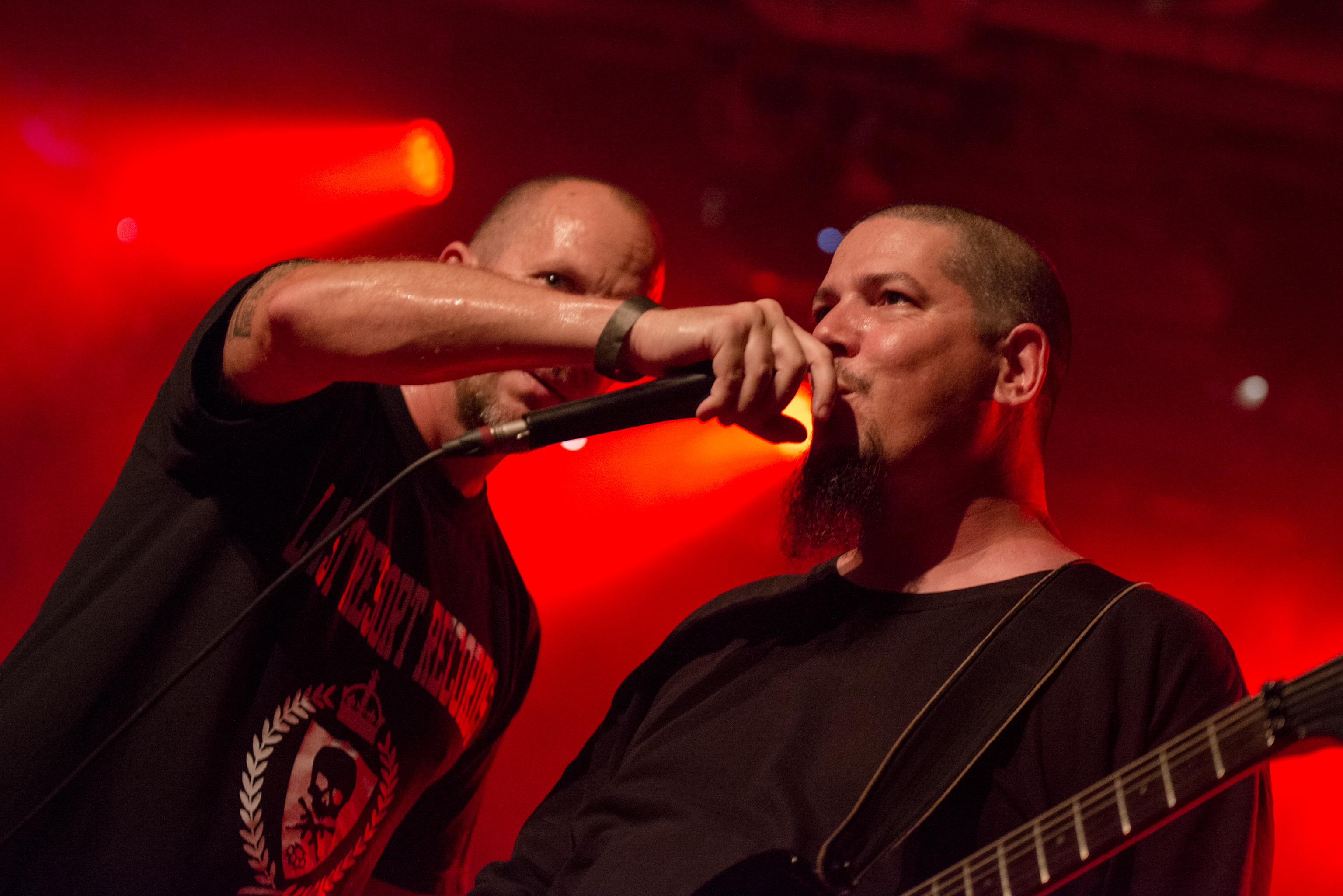 de